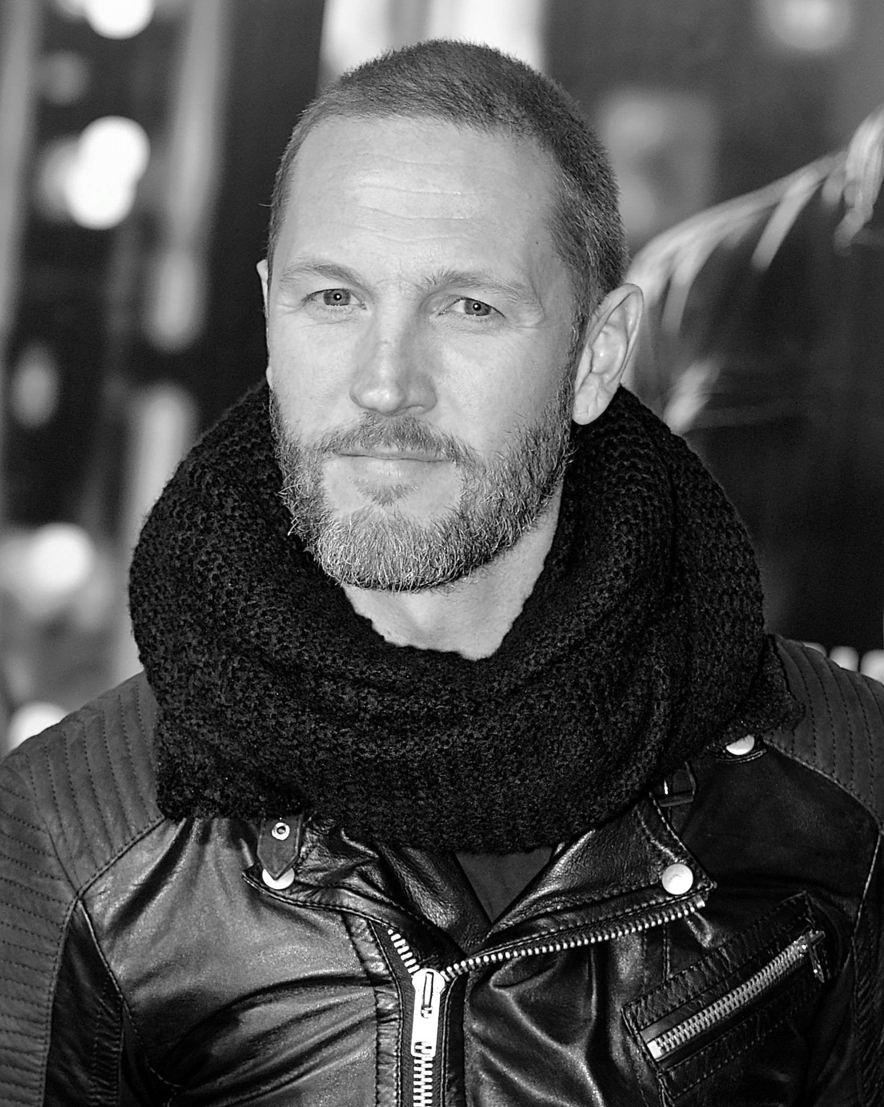 Martin Björk på filmpremiär av Jack Reacher i Filmstaden Sergel i Stockholm den 11 december 2012.